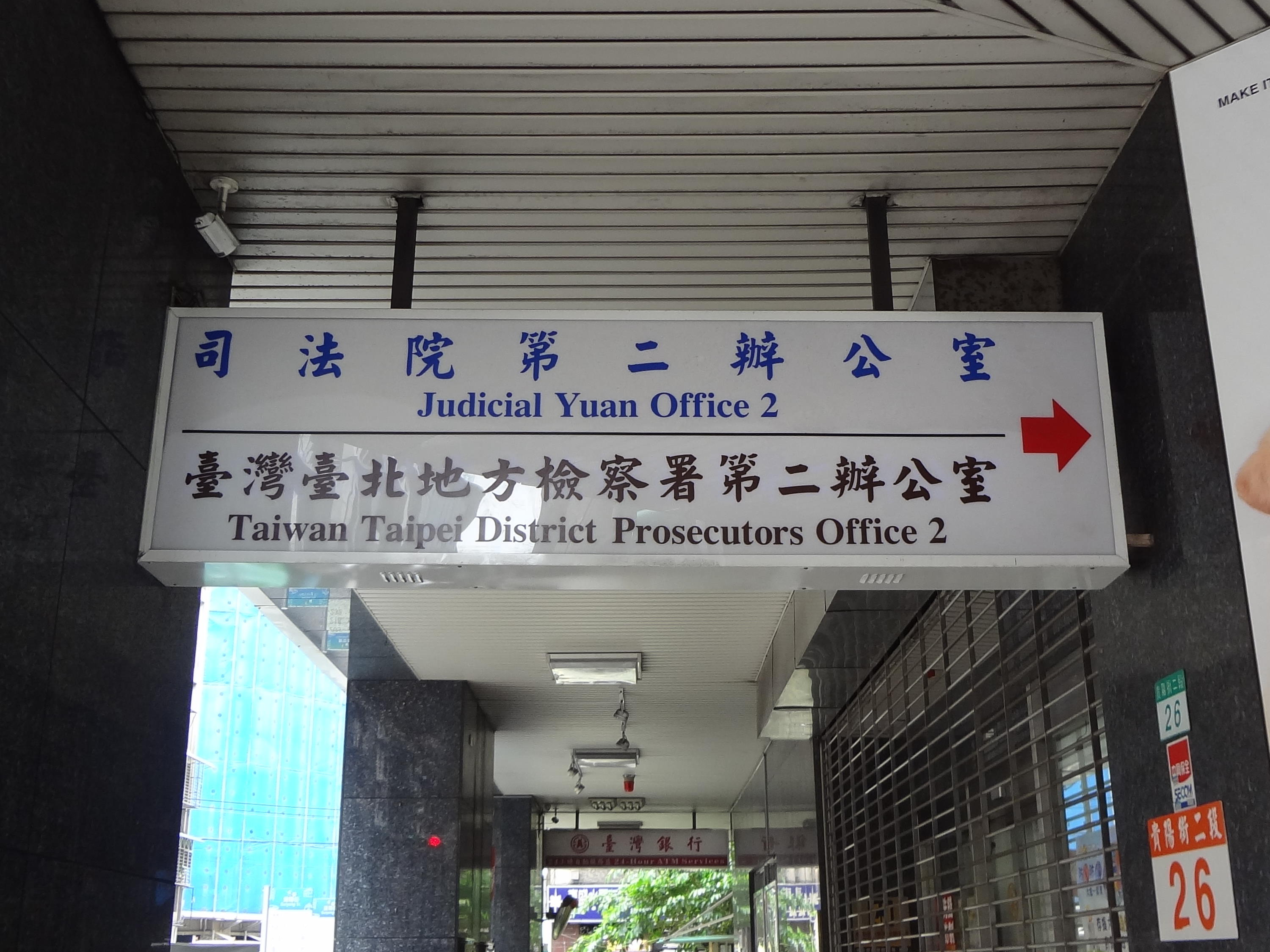 中文（台灣）: 司法院第二辦公室、臺灣臺北地方檢察署第二辦公室方向指示燈箱，位於臺北市萬華區貴陽街二段26號1樓騎樓（臺灣銀行萬華分行）。